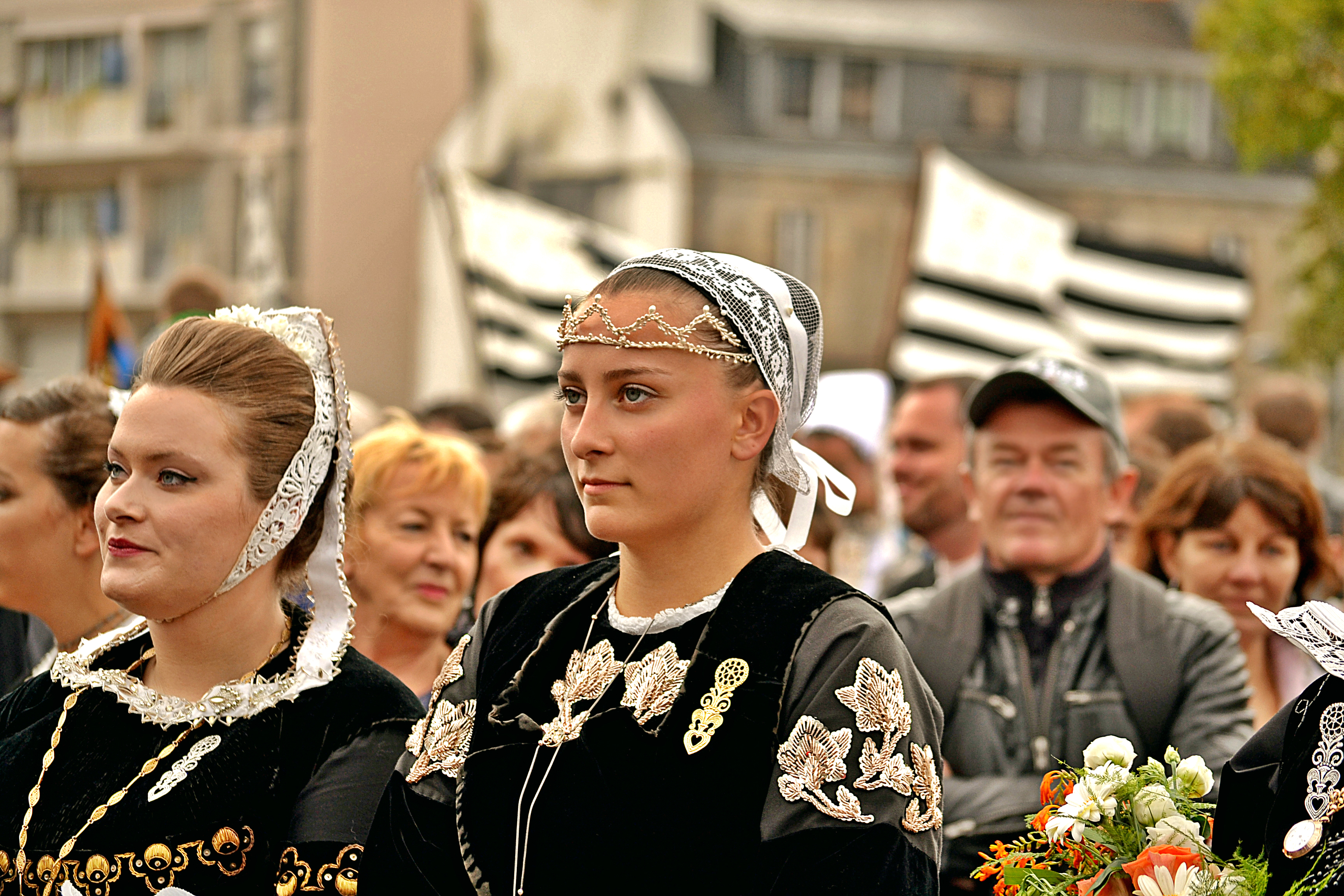 Magalie Gestin du cercle de Landrévarzec et Solenn Alain du cercle de Beuzec Cap Sizun, Reine de Cornouaille 2014, lors de l'hommage rendu au sonneur Erwan Ropars après le triomphe des sonneurs du Festival de Cornouaille 2015.